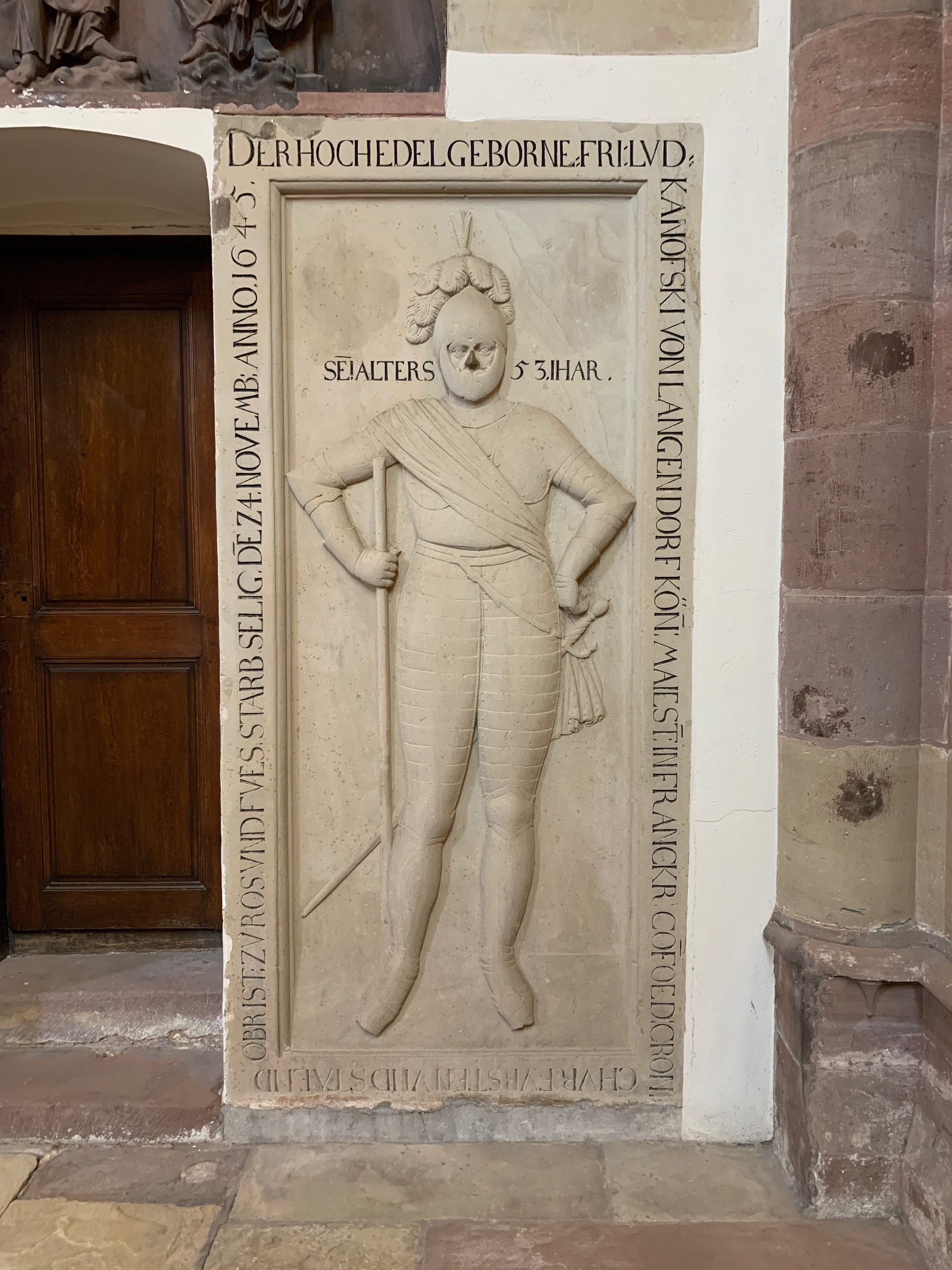 Intérieur de l'église Saint-Thomas de Strasbourg.